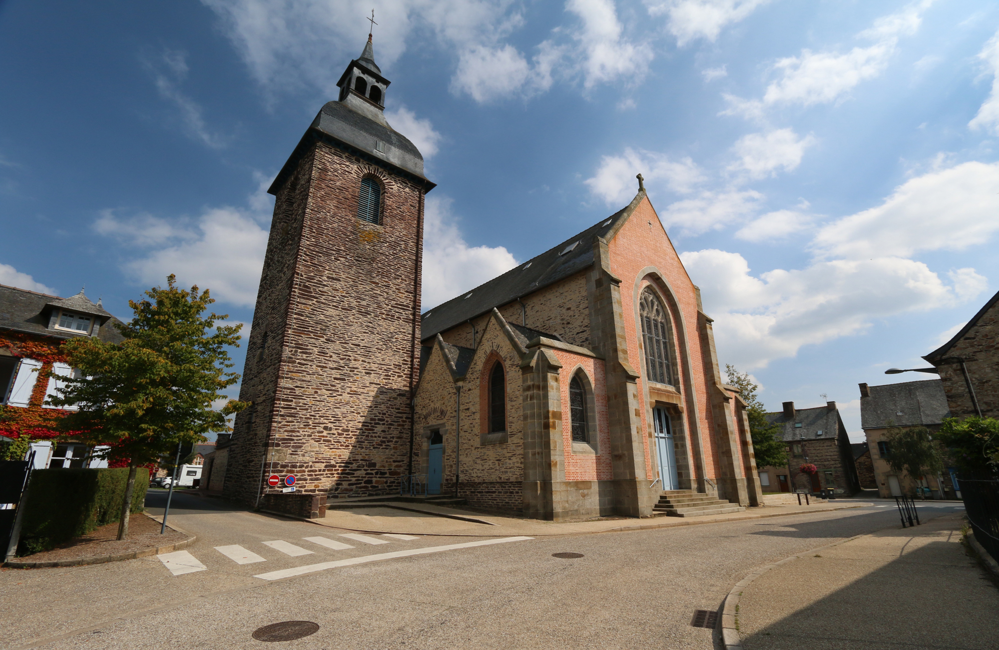 Église Saint-Pierre de Plélan-le-Grand